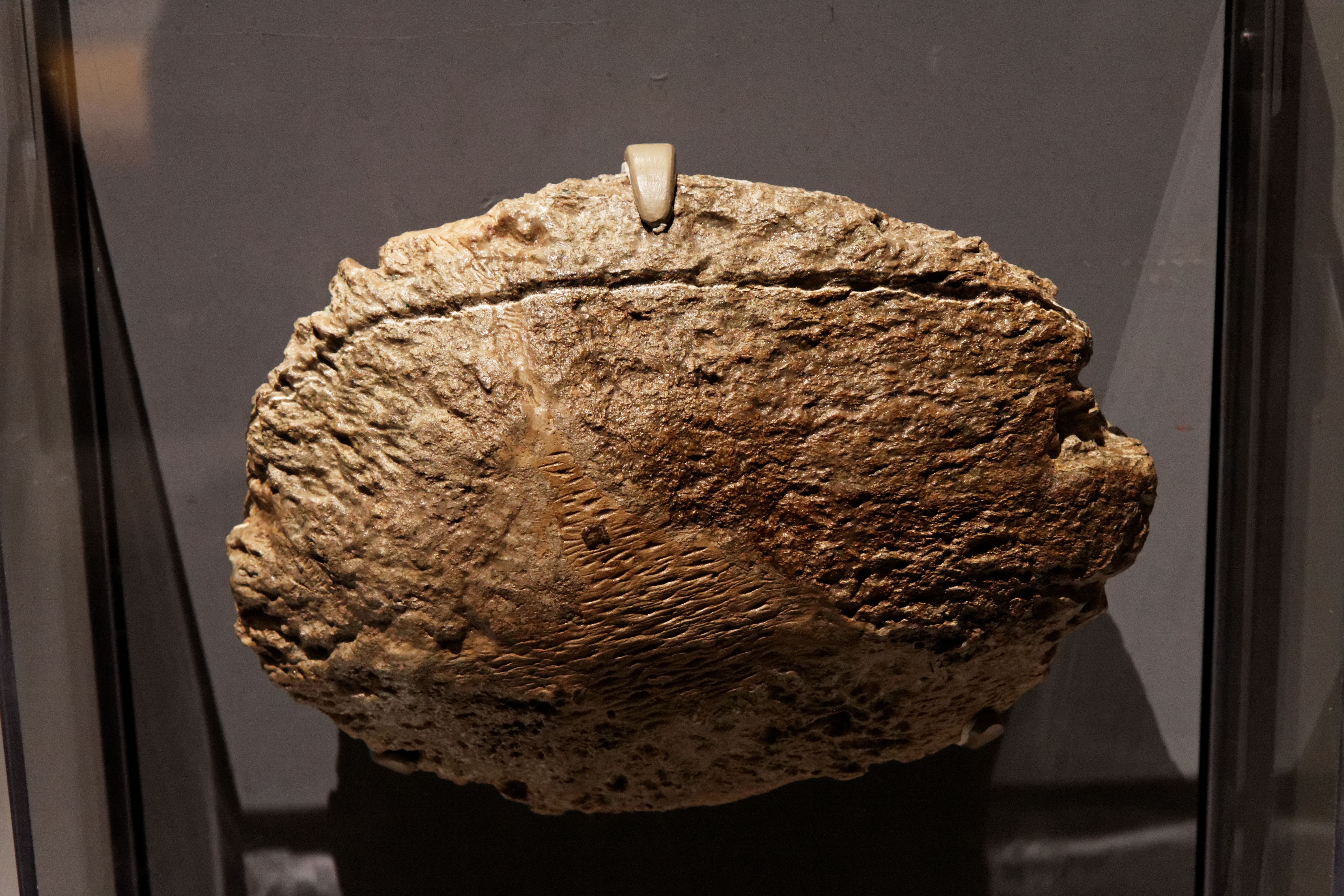 Un osteoderme de titanosaure exposé lors de l'exposition "la vie en grand" dans la grande galerie de l'évoution à Paris. Découvert en 1922 en Inde, les chercheurs ont mis plusieurs décennies avant de découvrir q'uil venait d'un titanosaure sans toutefois savoir lequel ni de quelle partie du corps il provient.